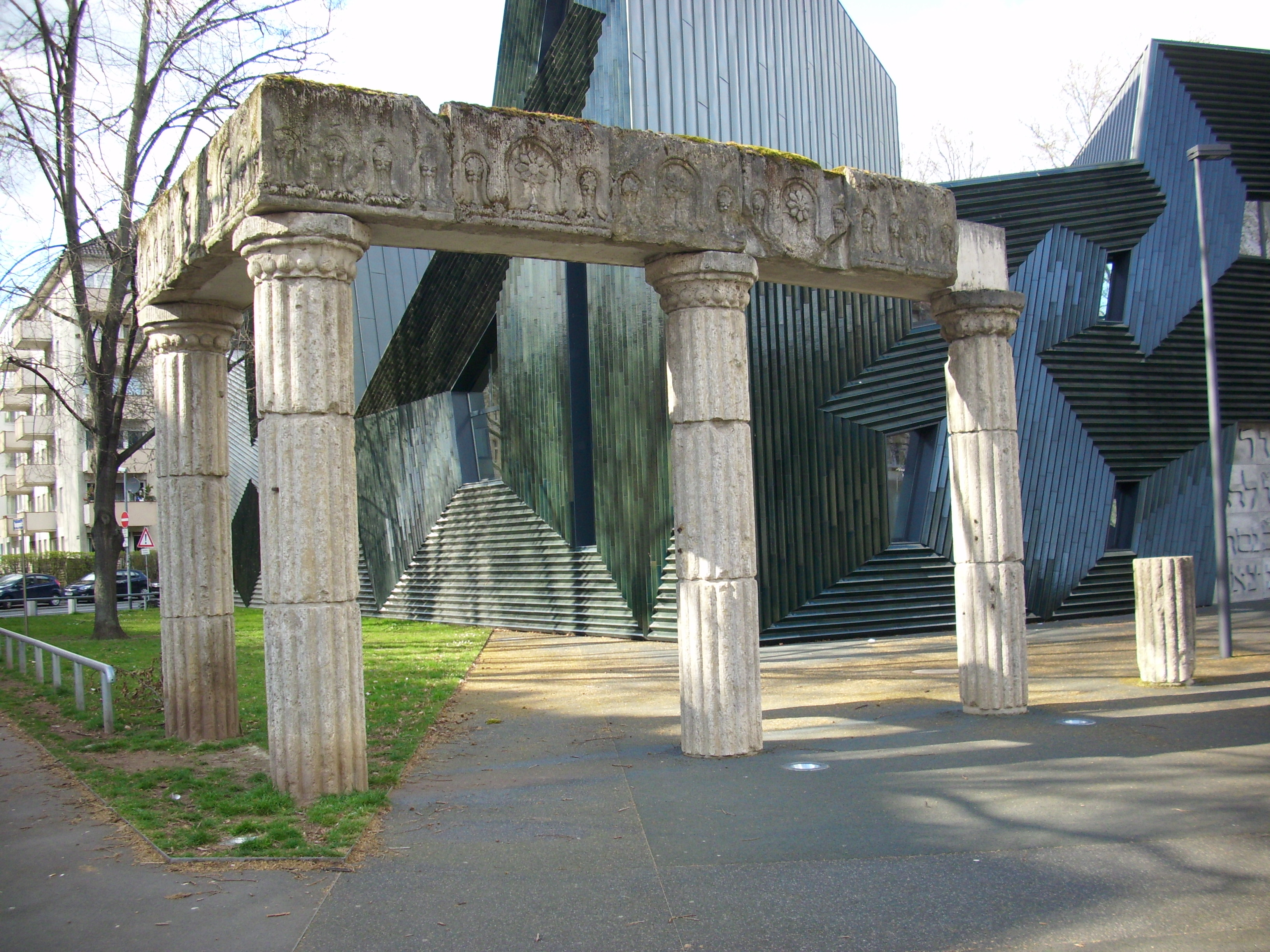 Fragmente der Vorhallenkolonnade der ehemaligen Hauptsynagoge, 1910–12, Architekt Willy Graf, Stuttgart, sowie Gedenktafel